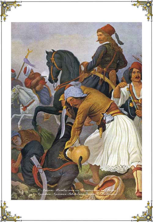 Η μάχη του Λάλα